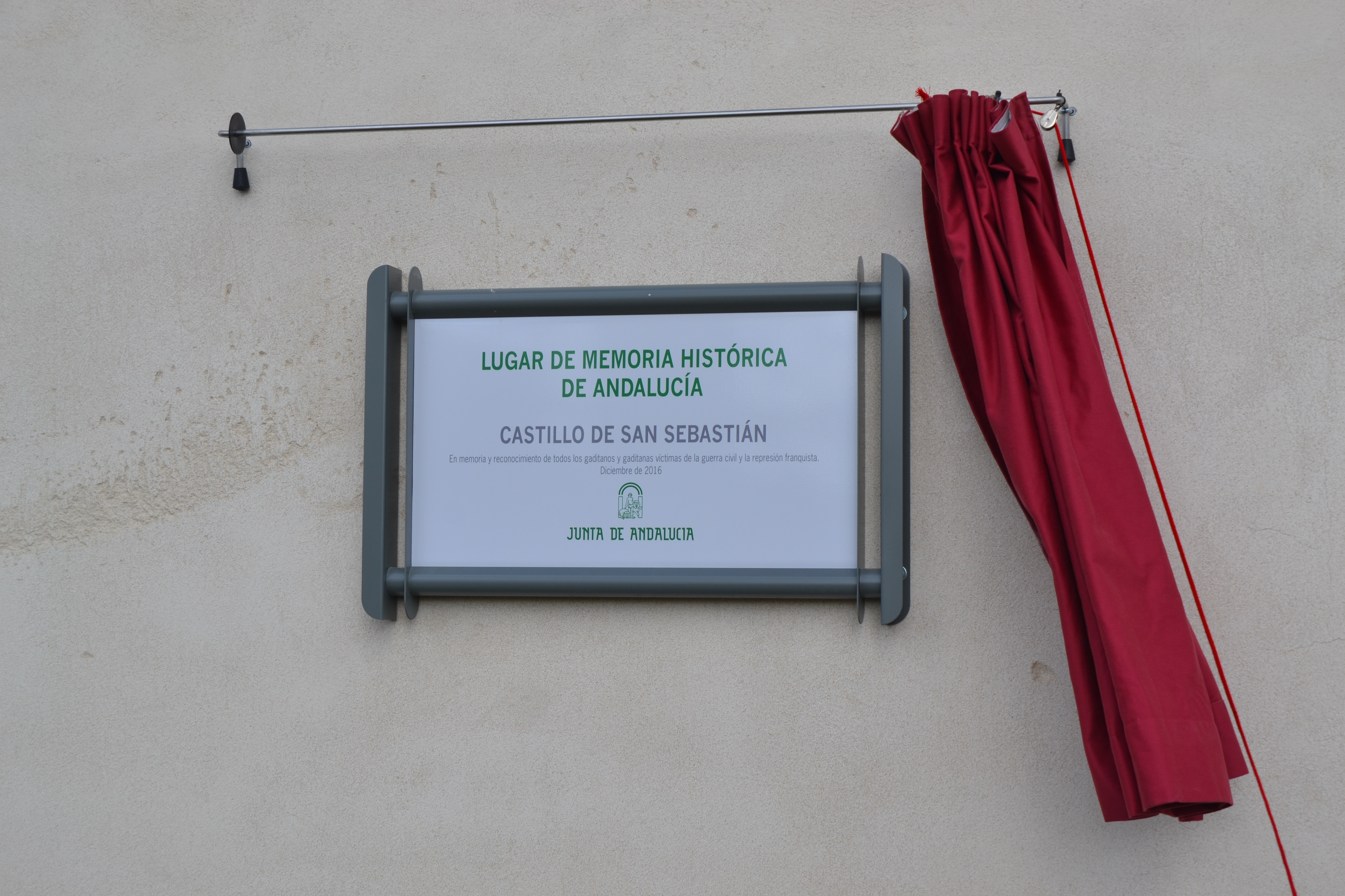 Placa en recuerdo de las personas fusiladas por el franquismo en el Castillo de San Sebastián de Cádiz.